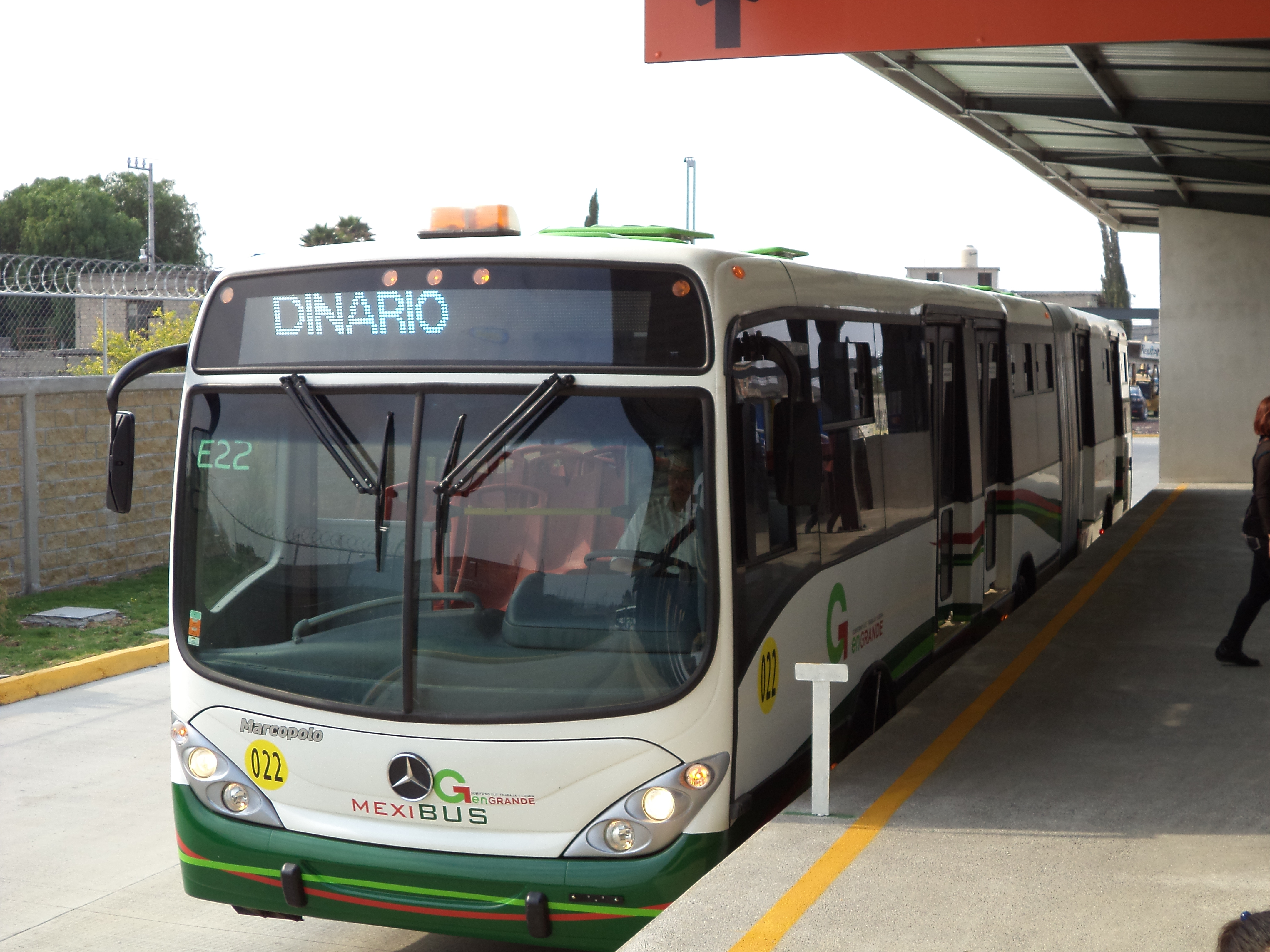 Mexibus